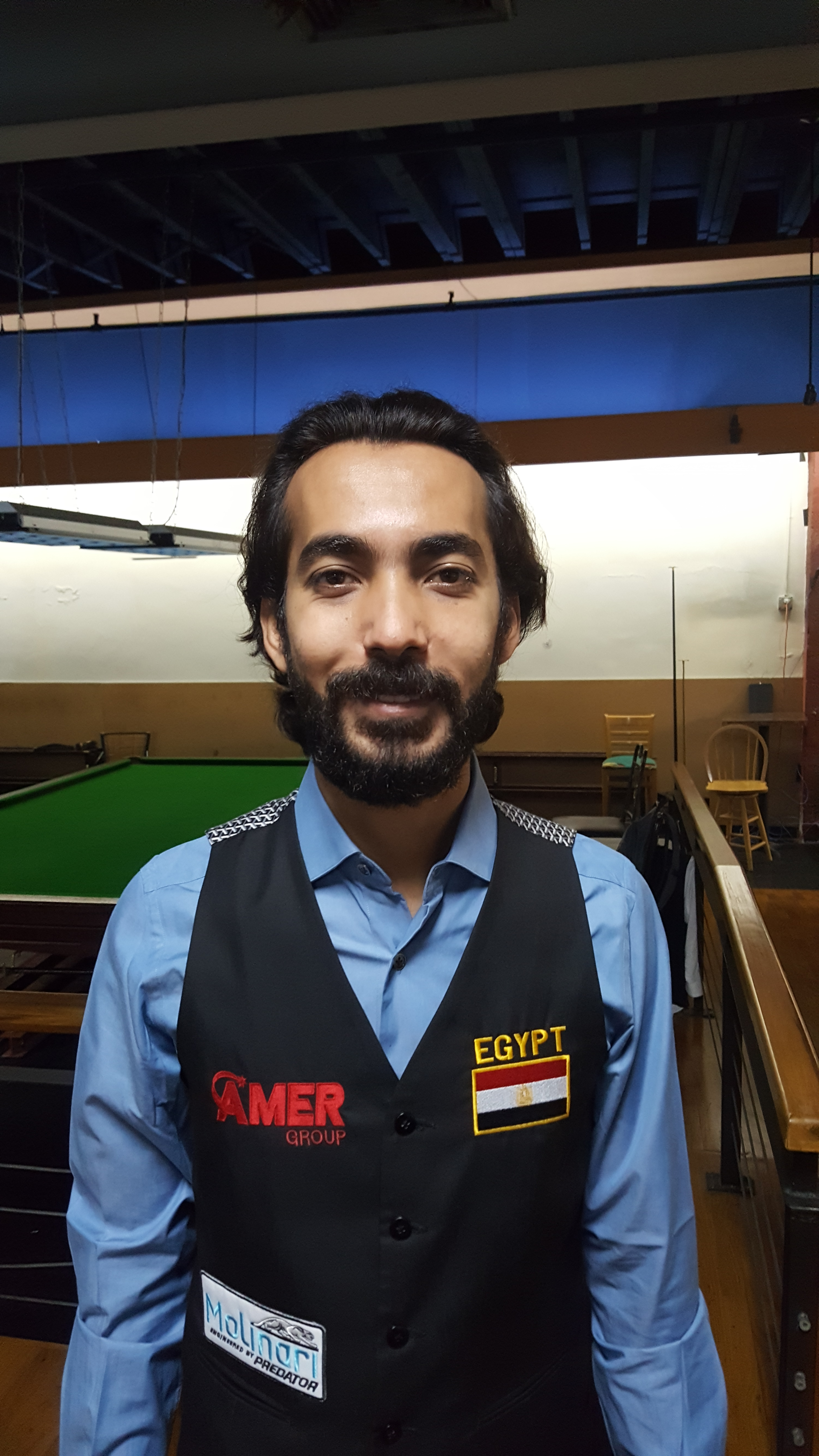 see file name